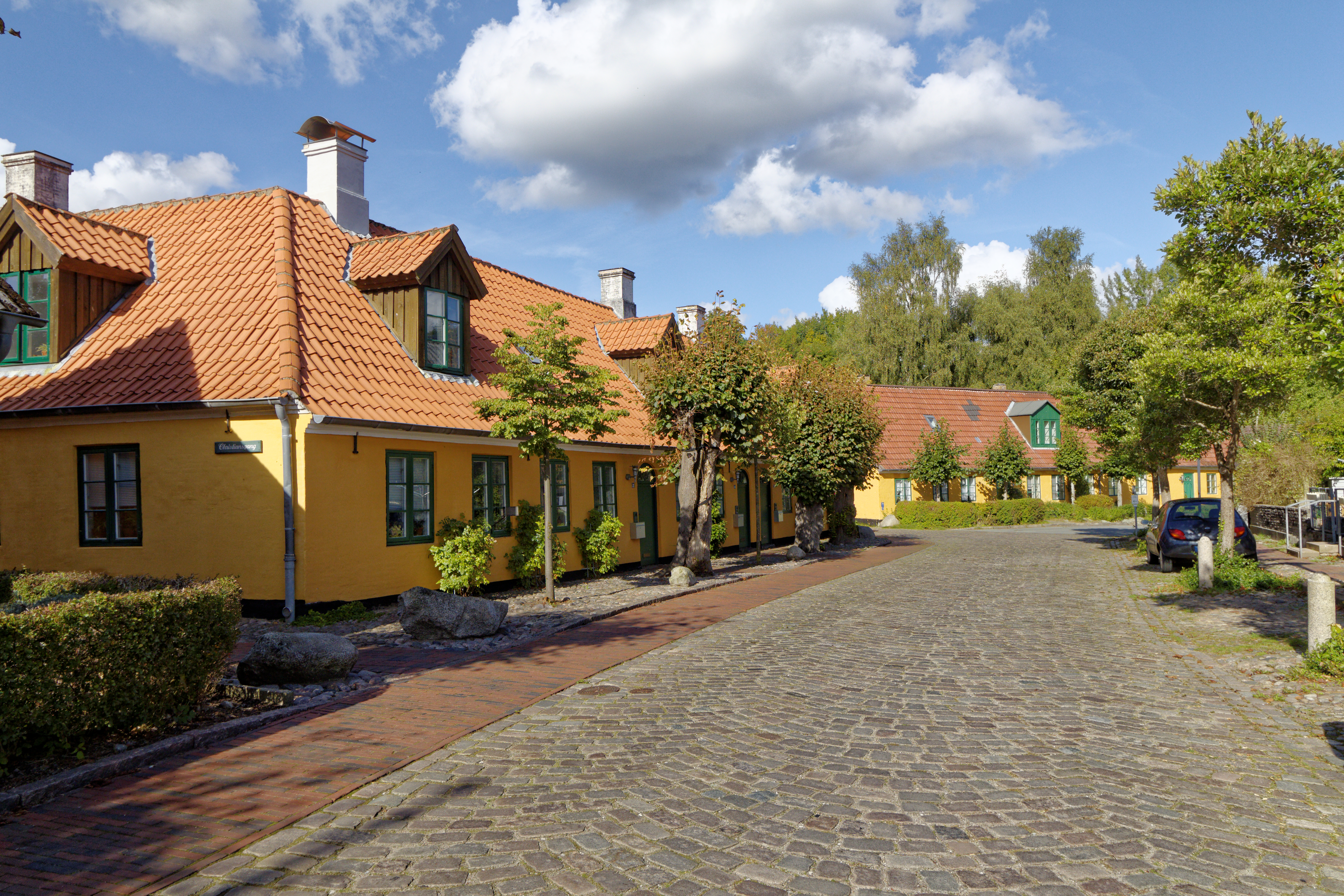 Harrislee Kupfermühle, Zur Kupfermühle 21-27